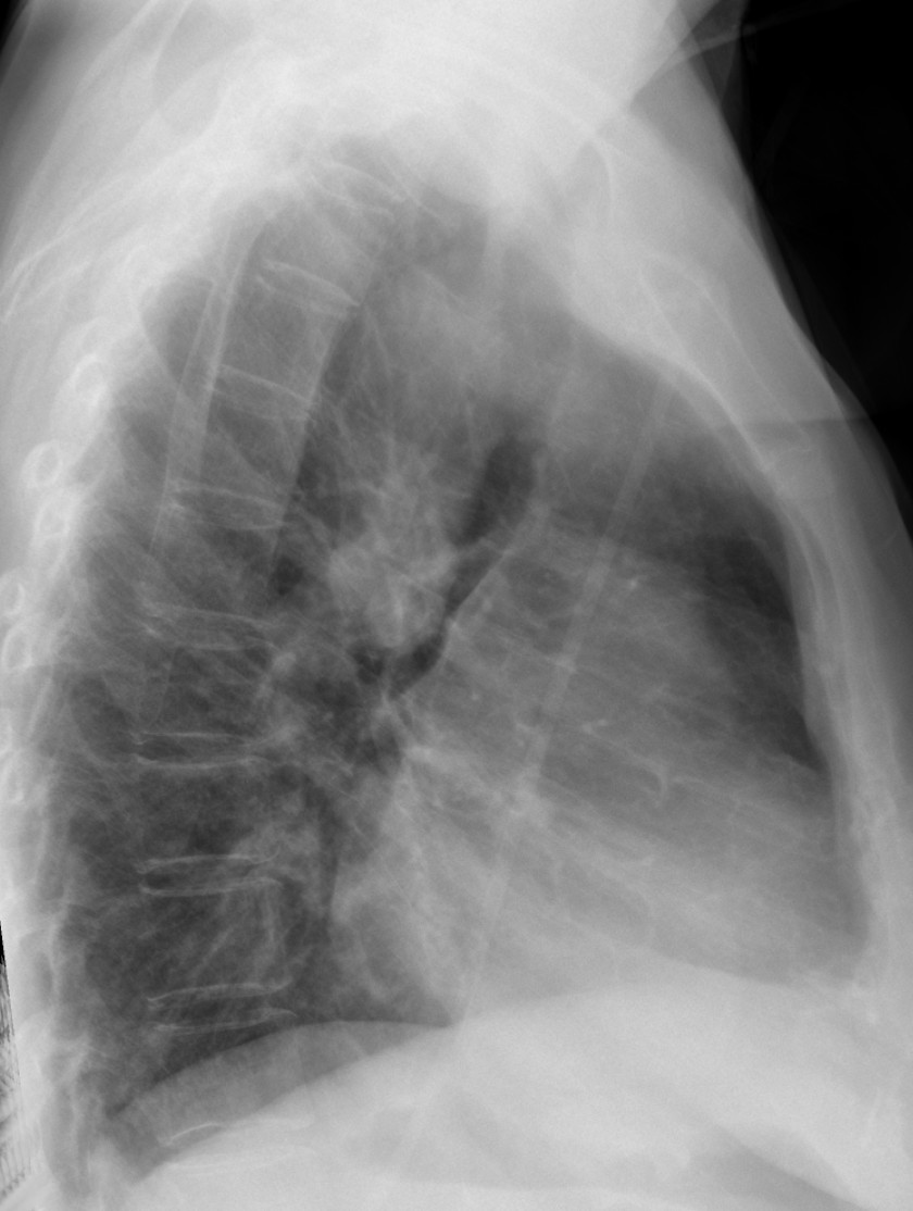 Normvariante eines Arcus aortae dexter im seitlichen Röntgenbild des Thorax.